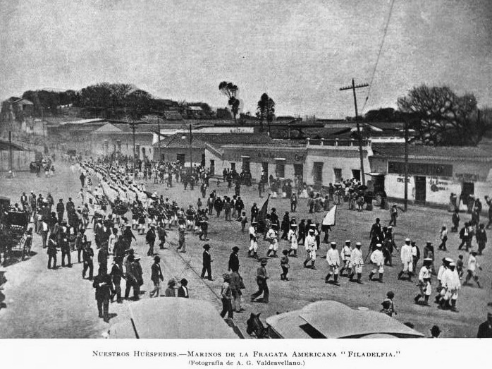 Marinos del buque estadounidense Filadelfia, desfilando el día de la inauguración de la Exposición Centroamericana.